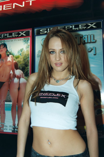 Bunny Luv